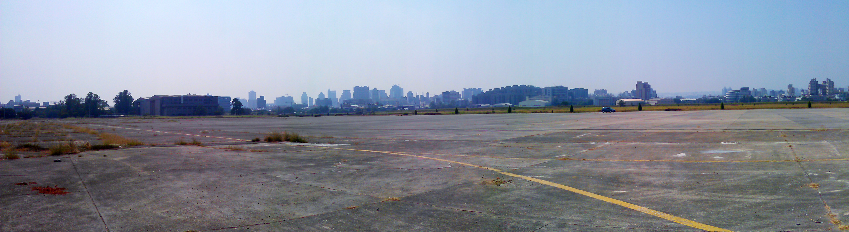 中文（台灣）: 水湳機場跑道